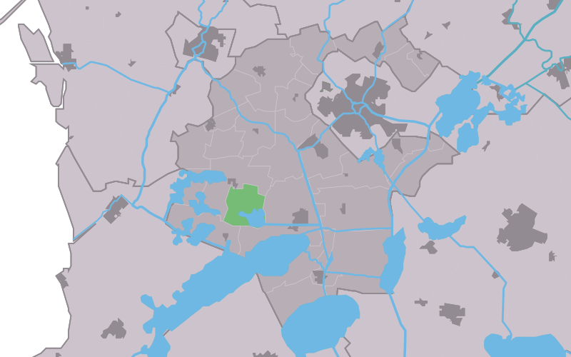 Kaartsje fan himrik fan Easthim